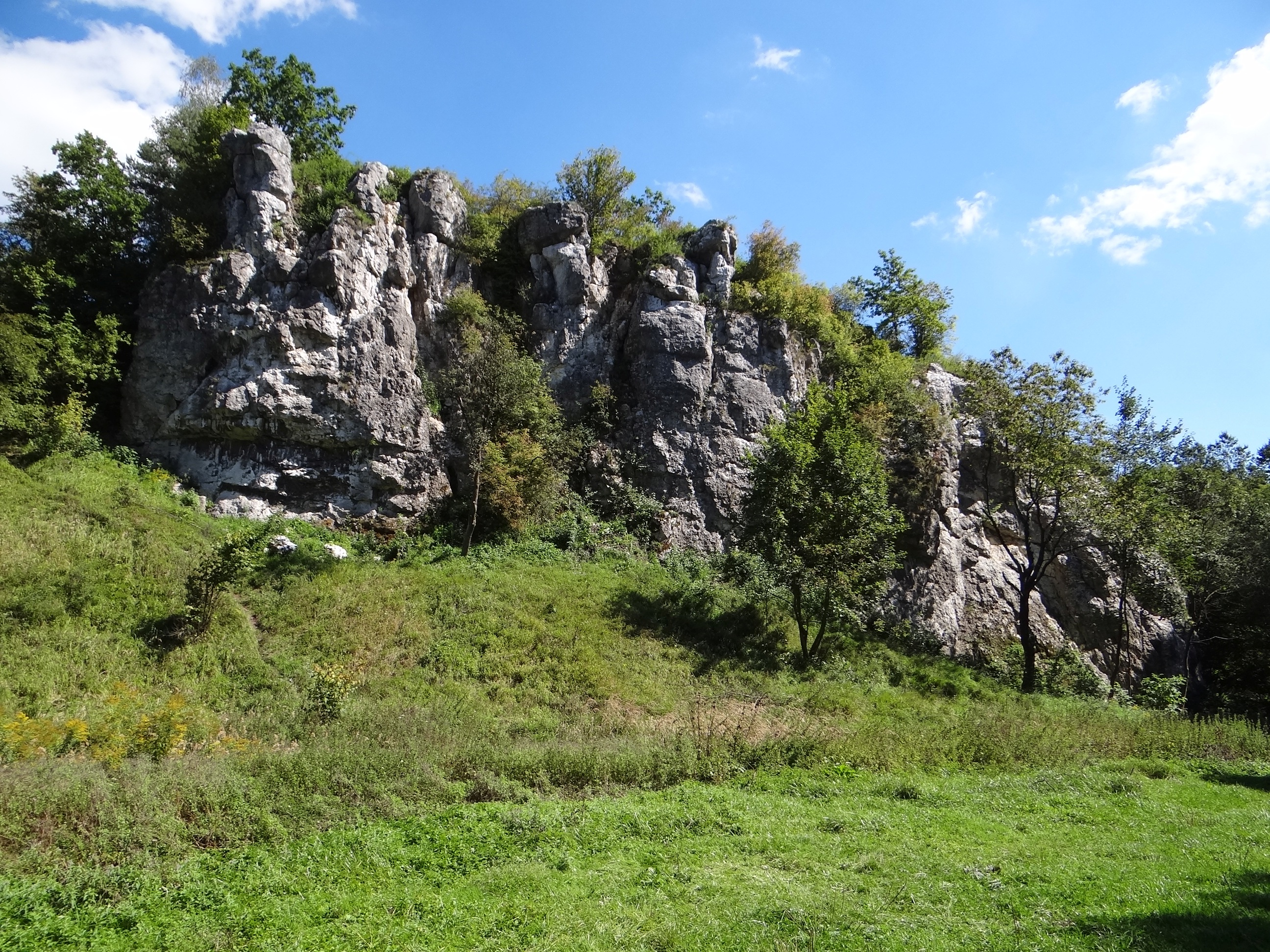 Skała Zamczysko w Dolinie Kluczwody